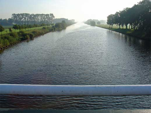 Het Twentekanaal bij de Dochterense brug